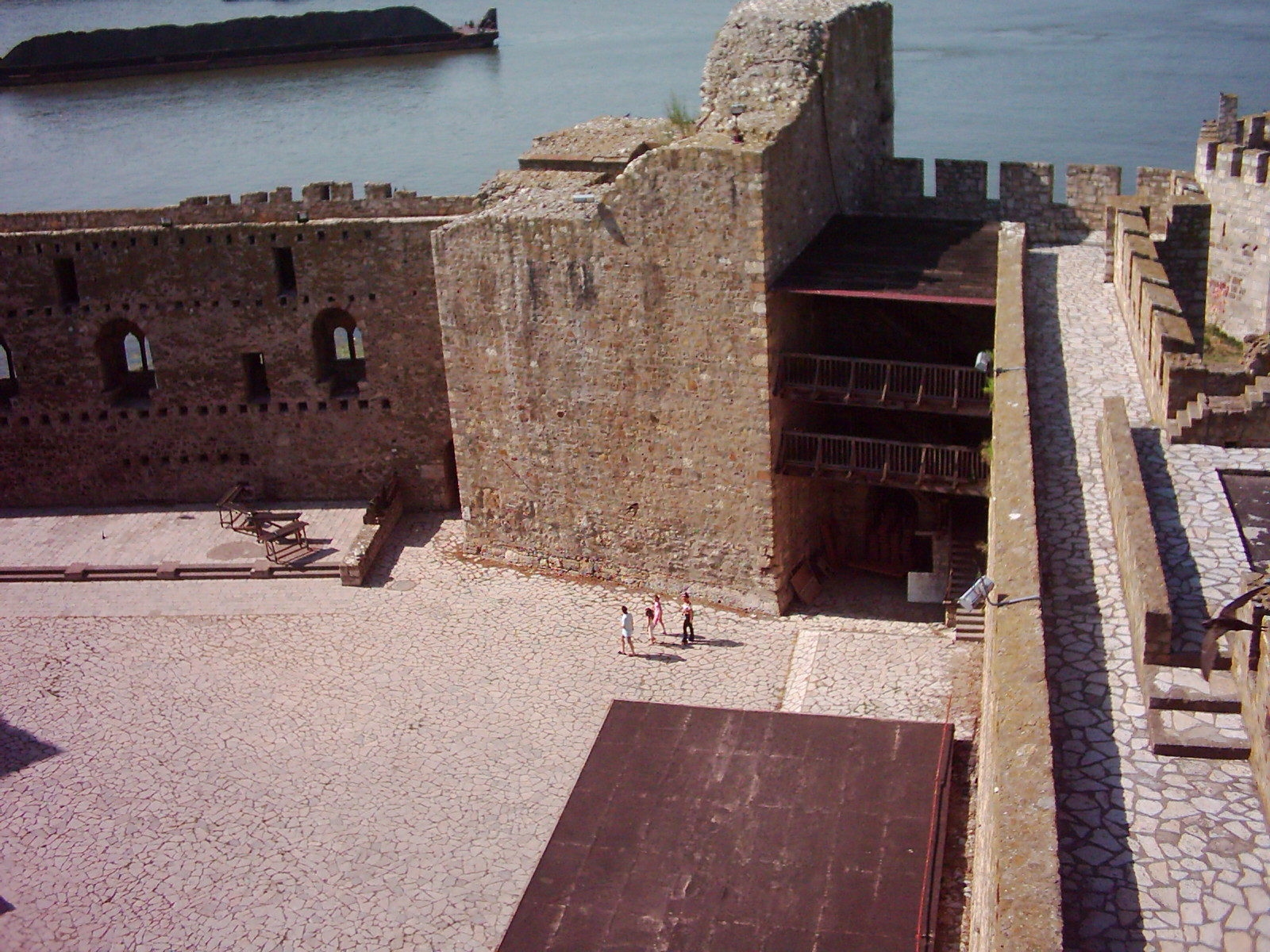 My picture. My editing. I give it (the picture) to the world